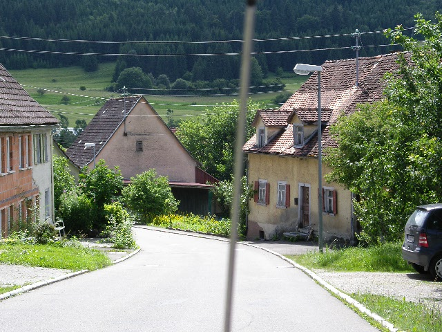 Bild zeigt alte Gebäude in Reichenbach auf dem Heuberg